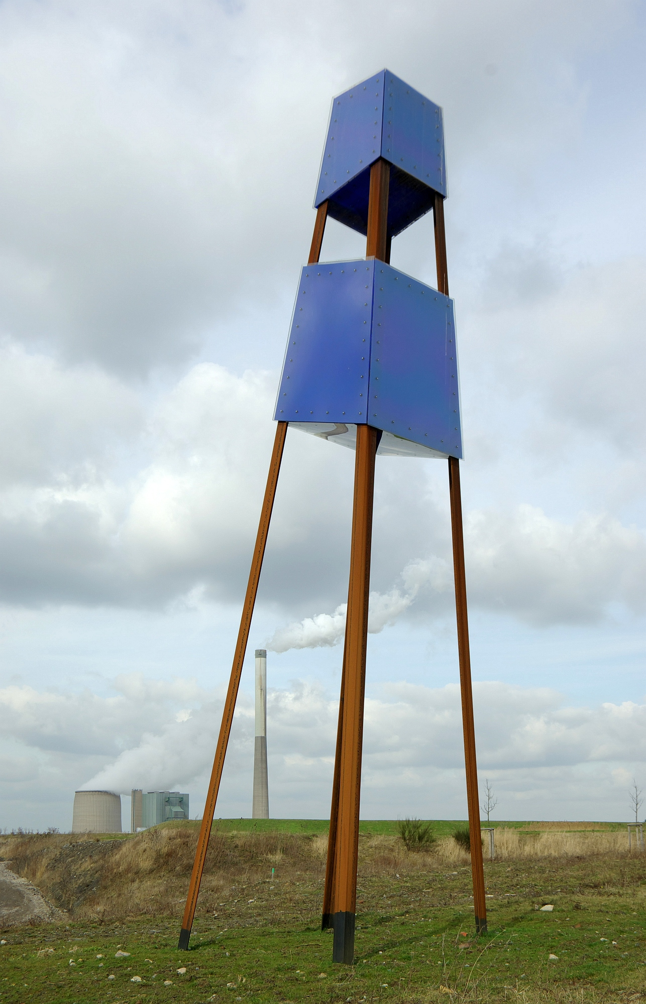 Bergkamen. Nachts beleuchtete Installation auf der halde Großes Holz, deren Formgebung an einen Förderturm erinnern soll. Im Hintergrund das Steinkohlekraftwerk in Heil.